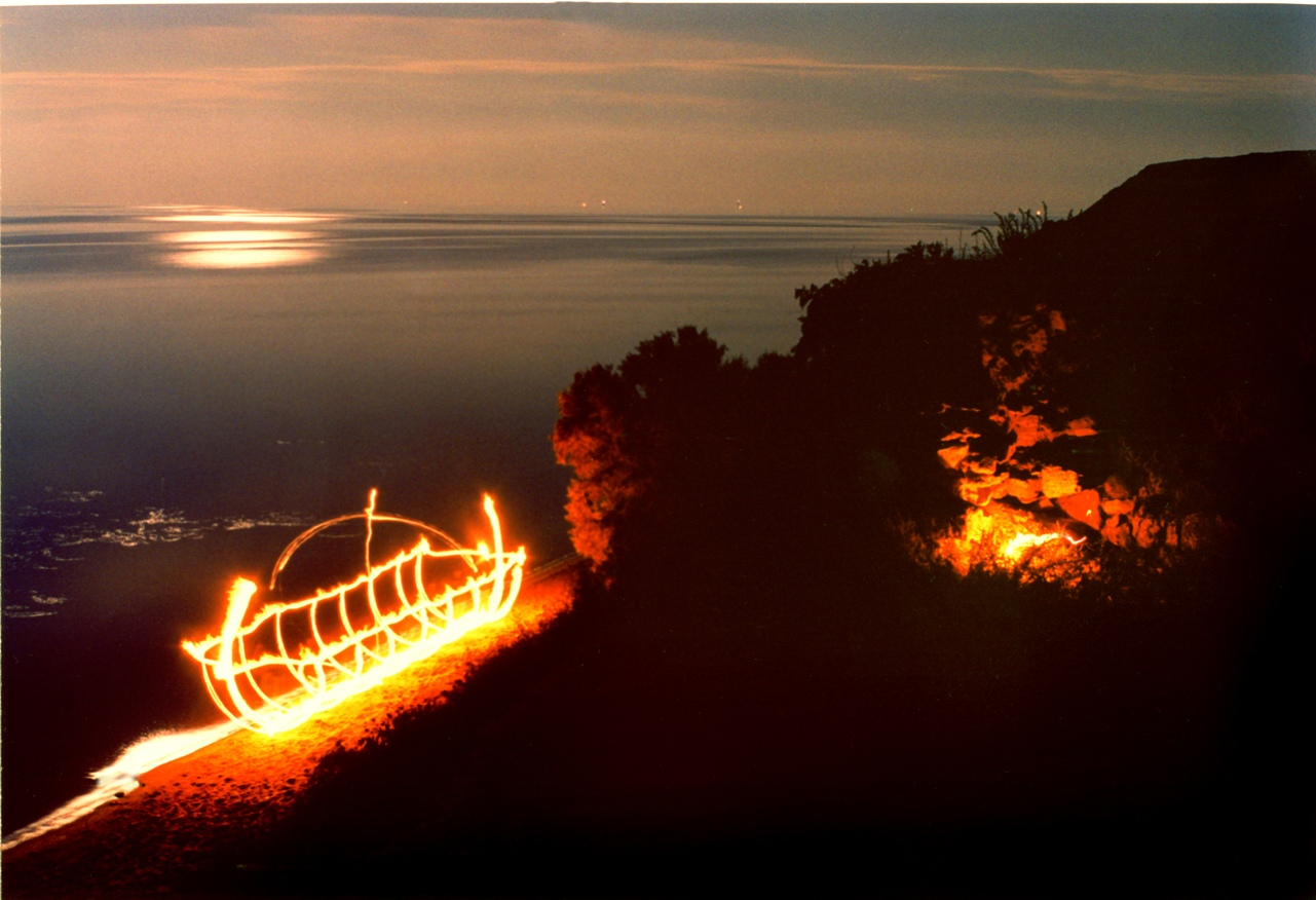 Фотография исторической реконструкции античного корабля В. Бахтова